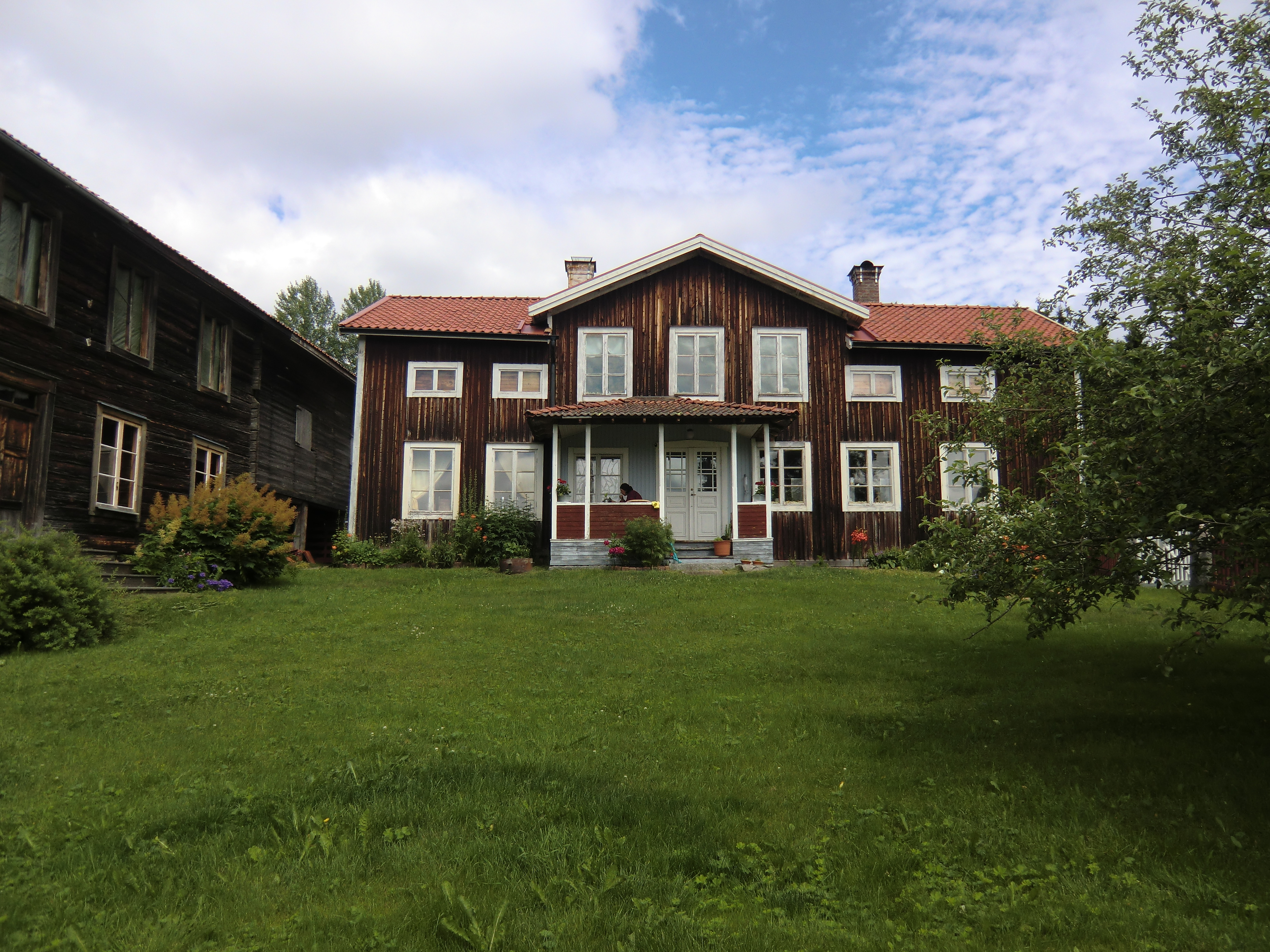 Gården Östas, Uvås by, Järvsö socken. Konstnären Per Nilsson-Östs barndomshem.